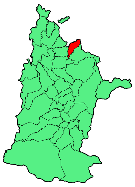 Aipaturiko udalerriaren kokapena Zuberoan